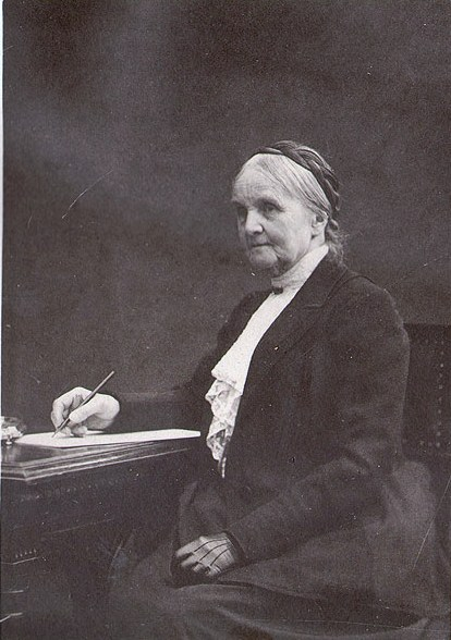 Прасковья Сергеевна Уварова, ур. Щербатова (1840-1924)